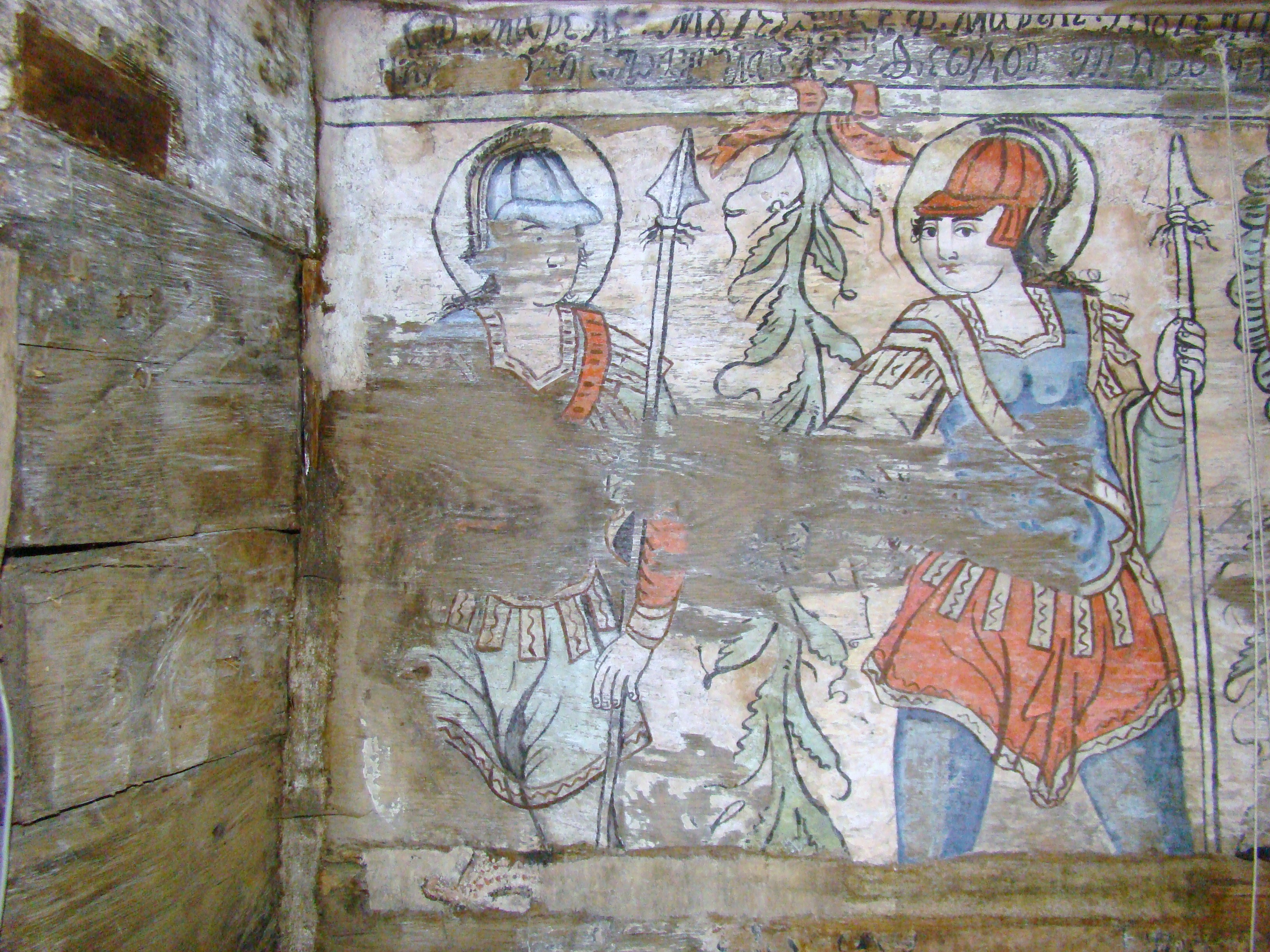 Biserica de lemn "Intrarea Maicii Domnului în Biserică" , sat BÂRSANA